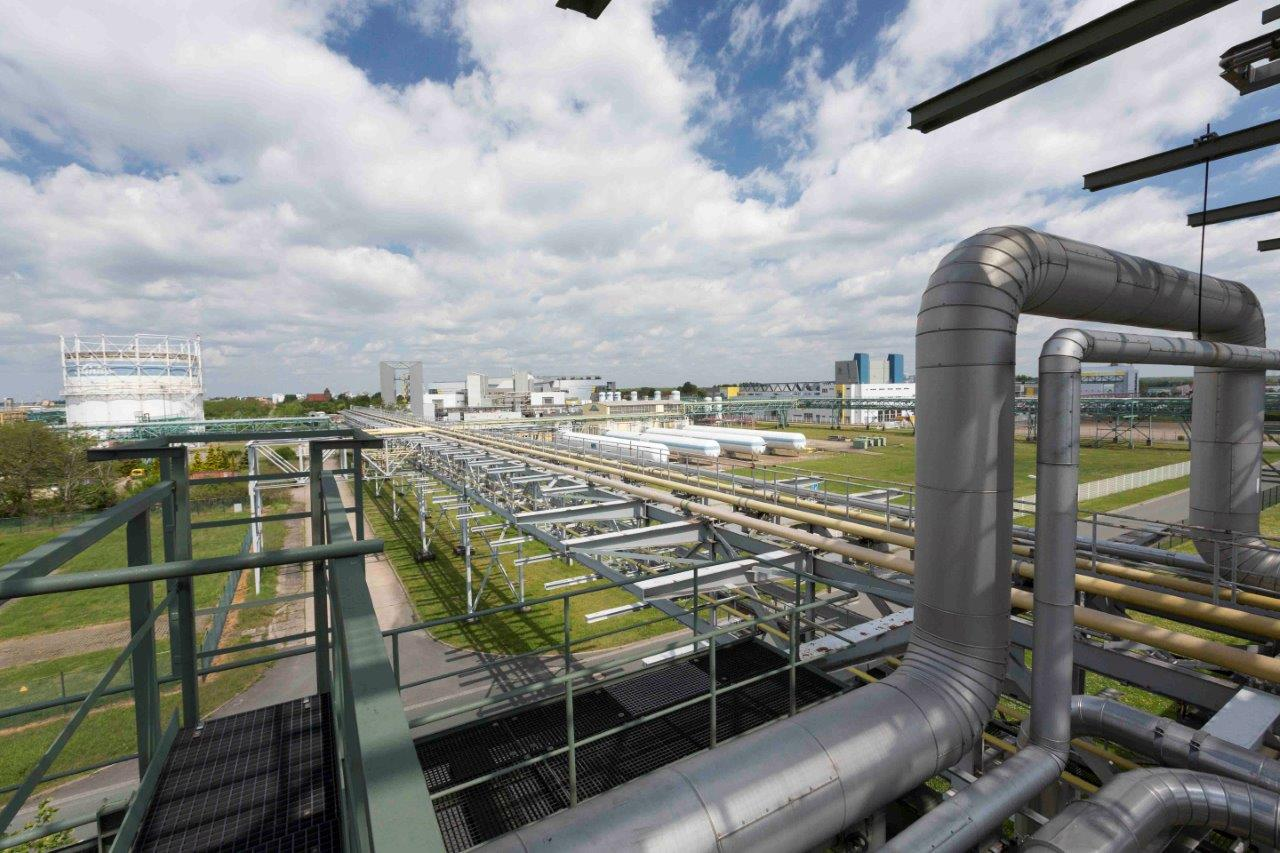 Ein verzweigtes Rohrbrückensystem vernetzt die ansässigen Unternehmen. Im Hintergrund der Gasometer von der Linde AG und die Heraeus Quarzglas GmbH & Co. KG